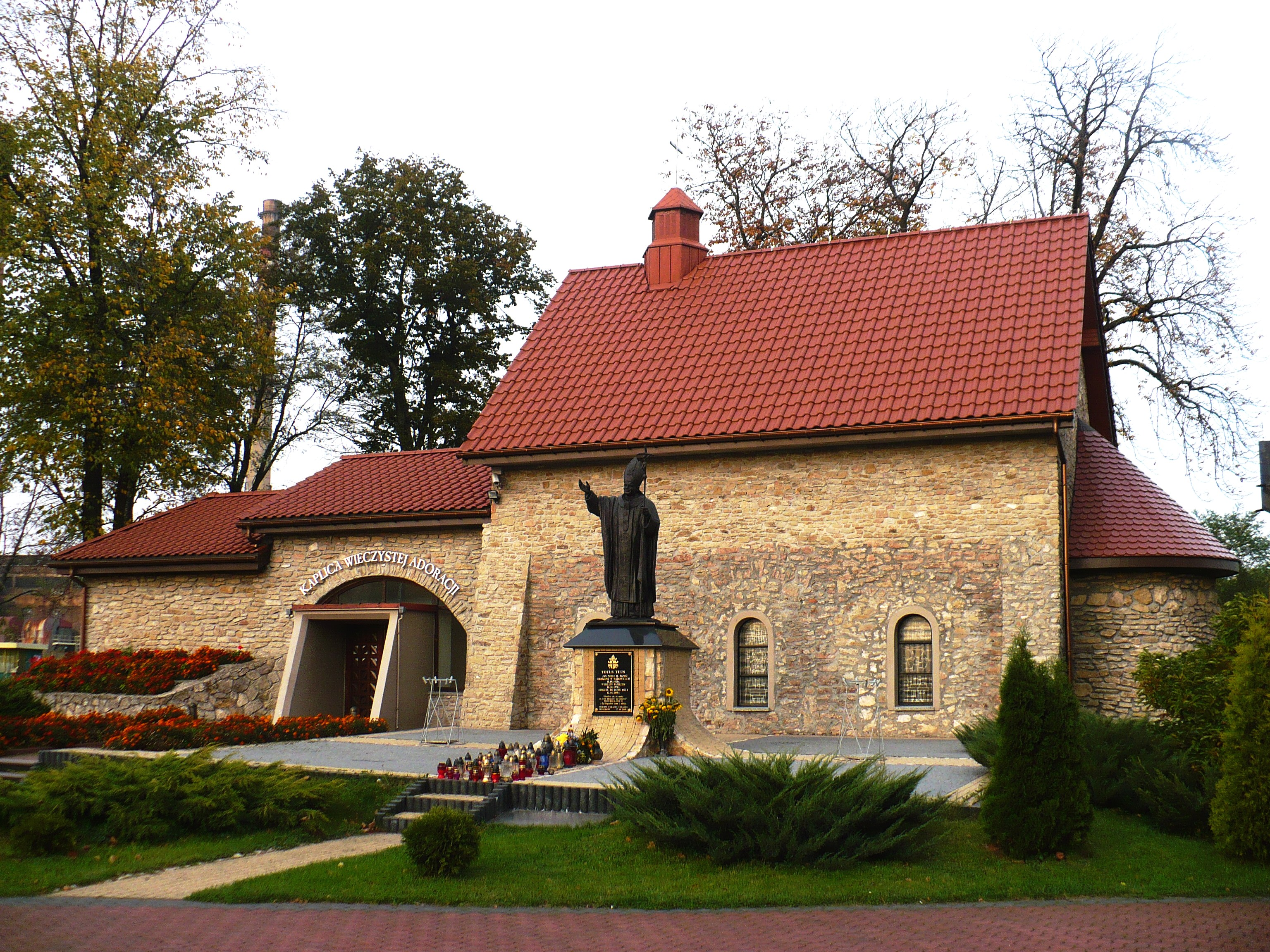 Zabytkowa kaplica Narodzenia Pana Jezusa w Myszkowie Mijaczowie